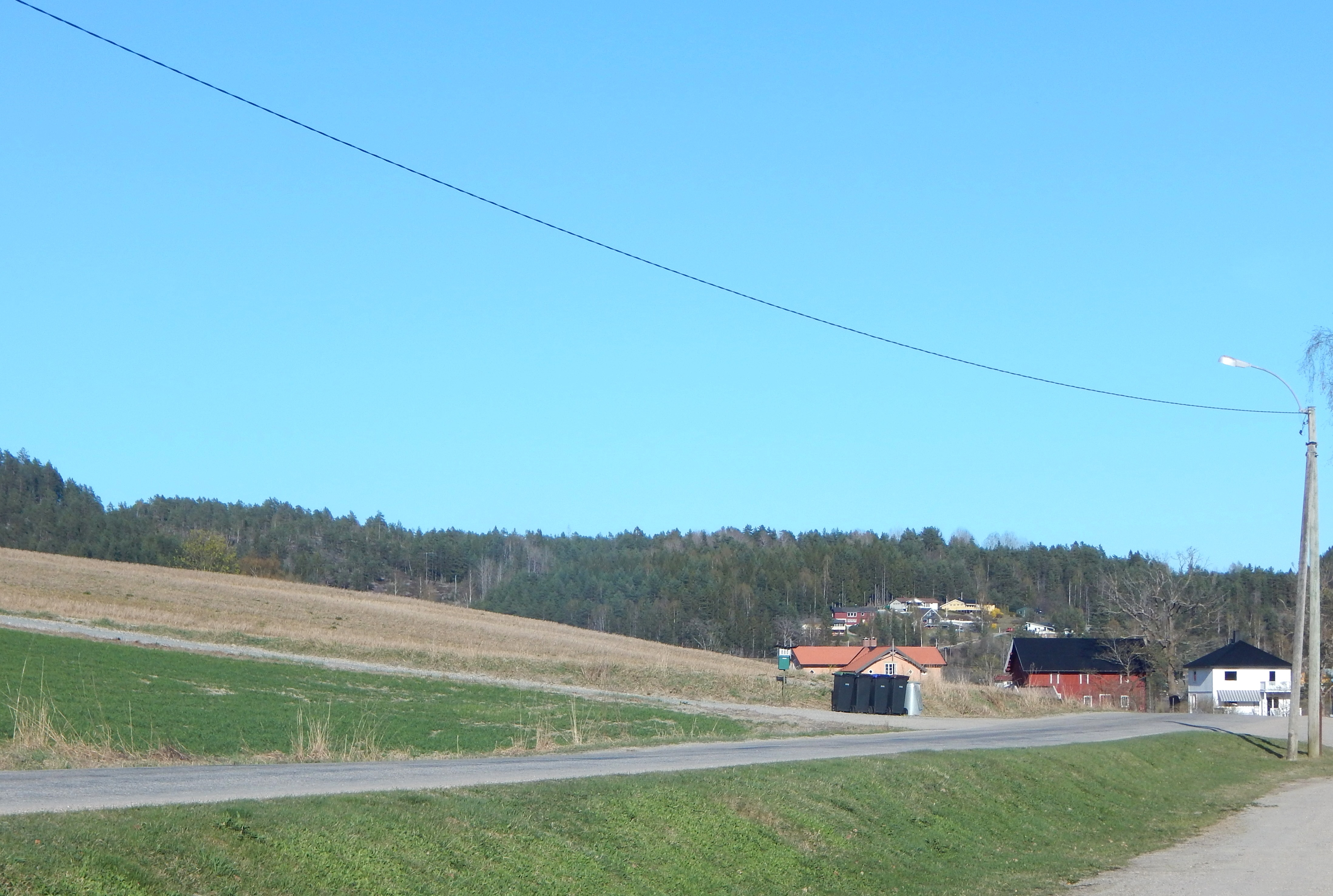 Vrangfossvegen ved Lunde kirke